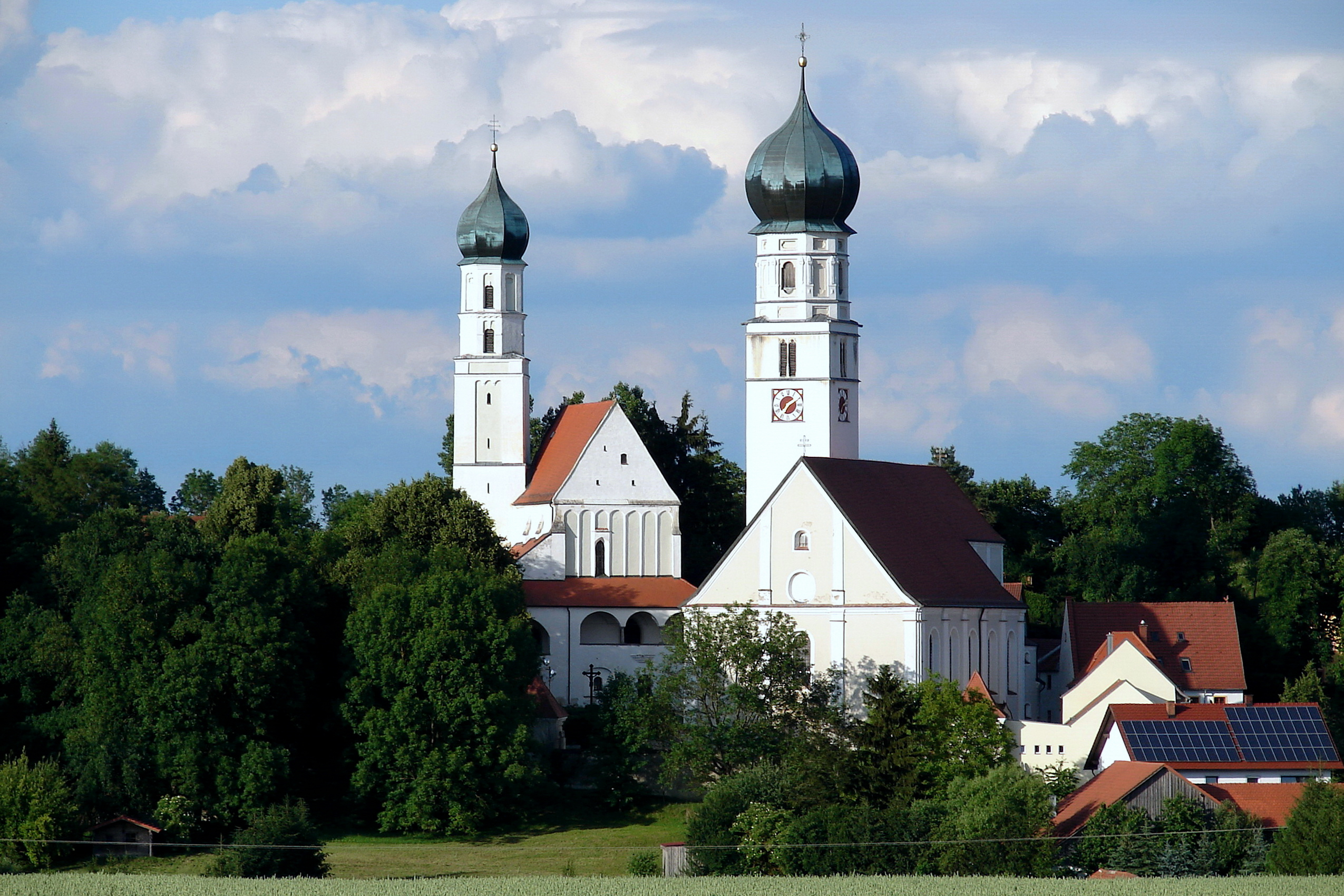 Ensemble Kirchengruppe Haindling